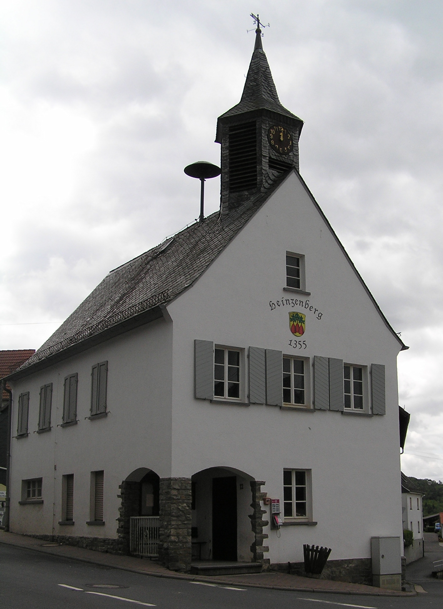 Altes Rathhaus von Heinzenberg